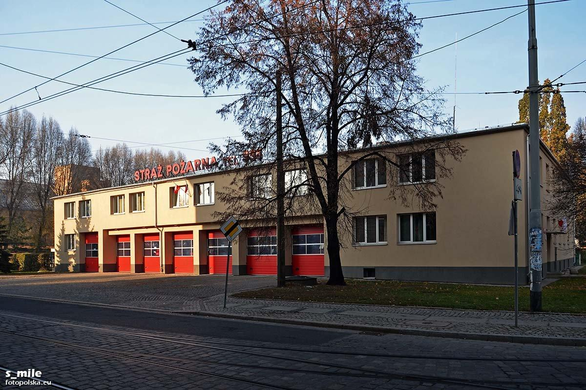 Teatralna 16-20 - Straż Pożarna